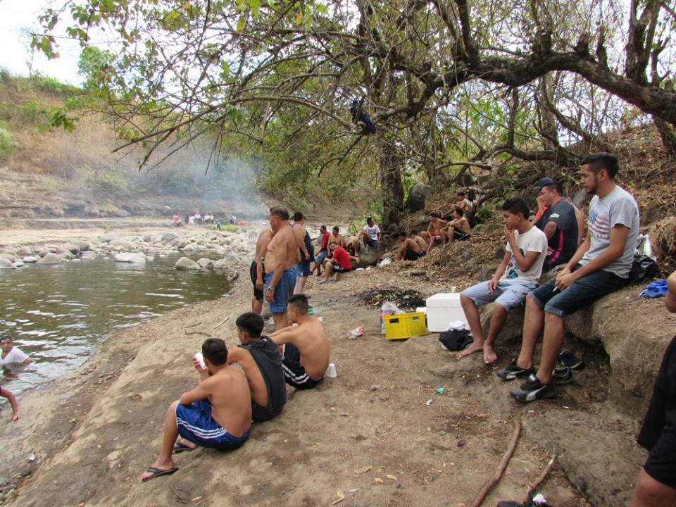 Balneario